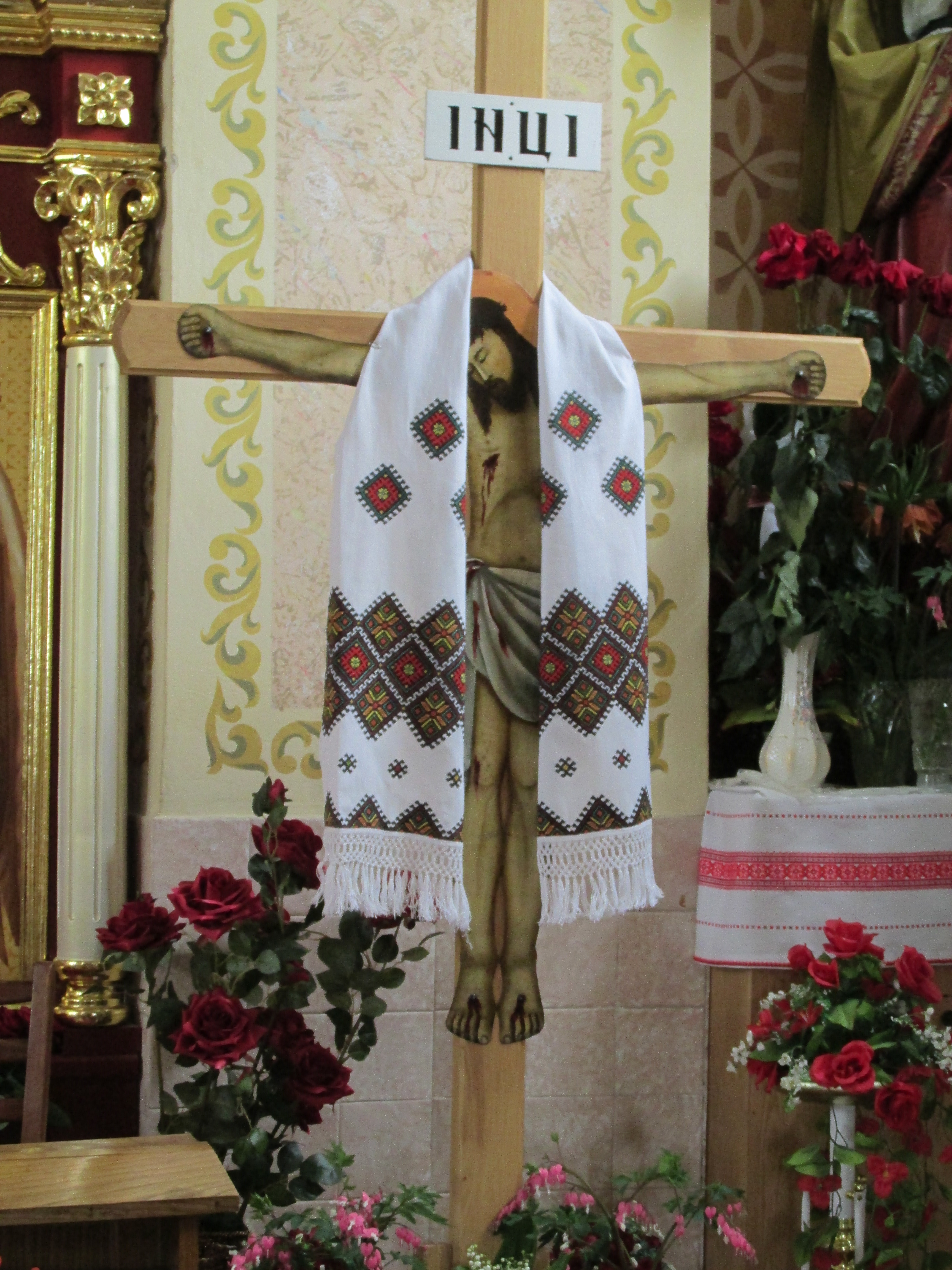 Церква святого Архістратига Михаїла в Бучачі. Розп'яття